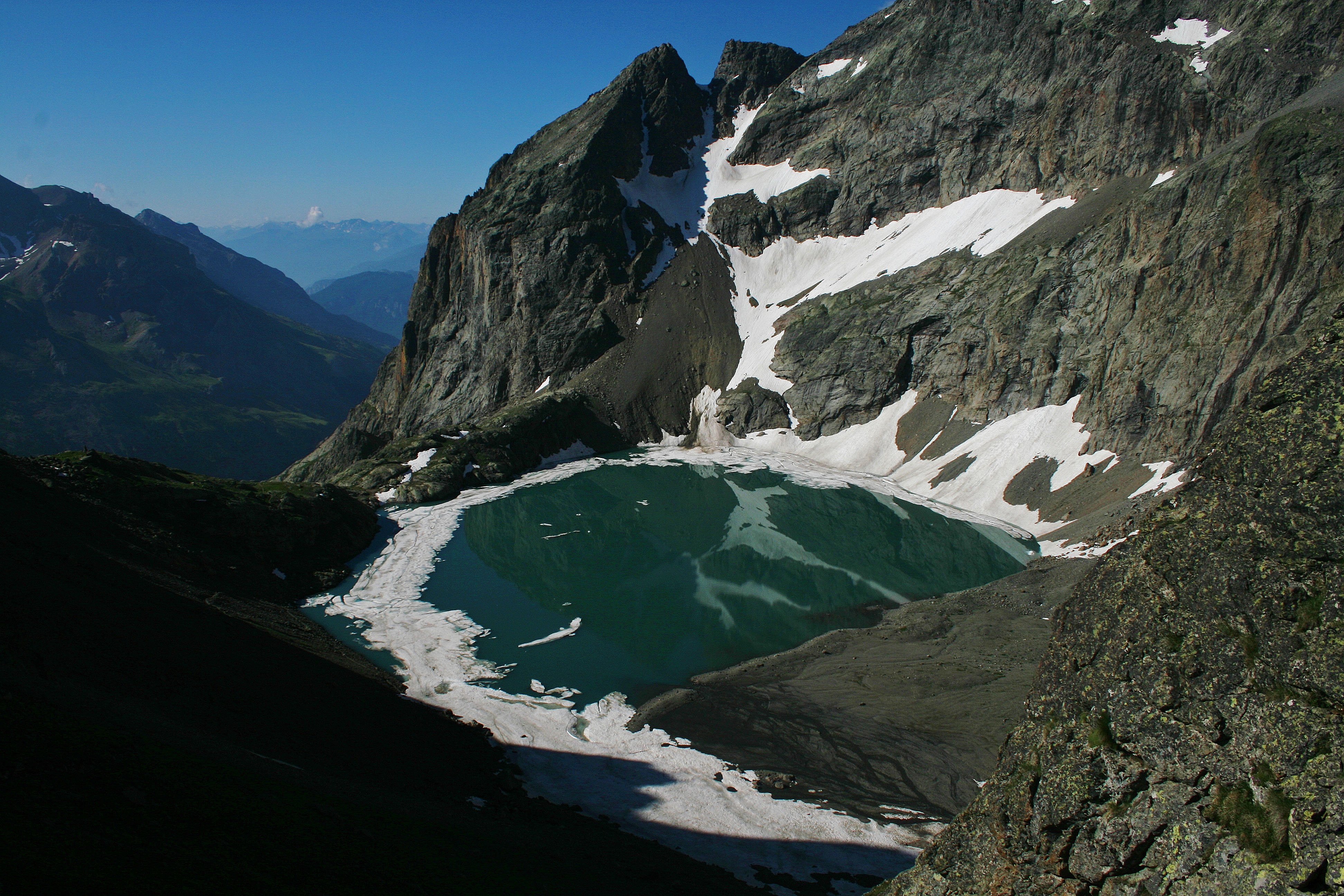 Une goutte d'eau